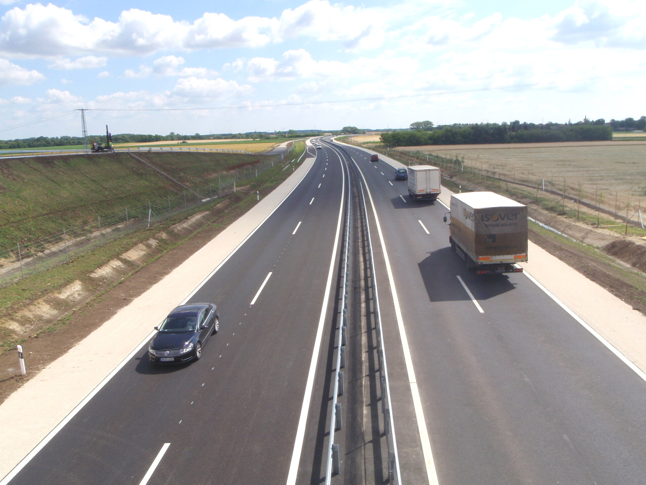 M86 átadott szakasza, Csorna felé nézve Szombathely-Zanat mellett